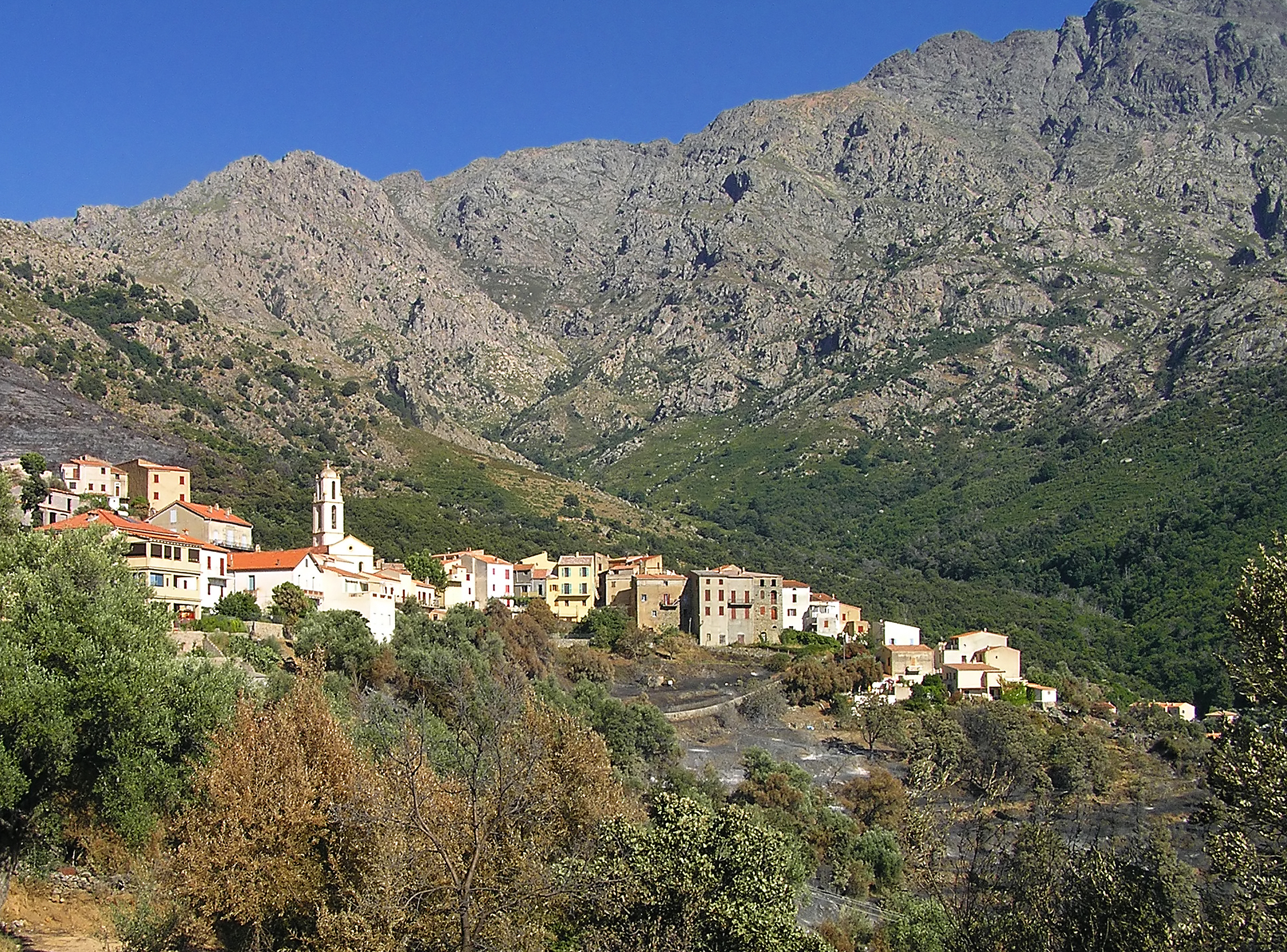 Le village de Zilia au 03-07-2005, deux jours après l'incendie qui avait démarré à Calenzana